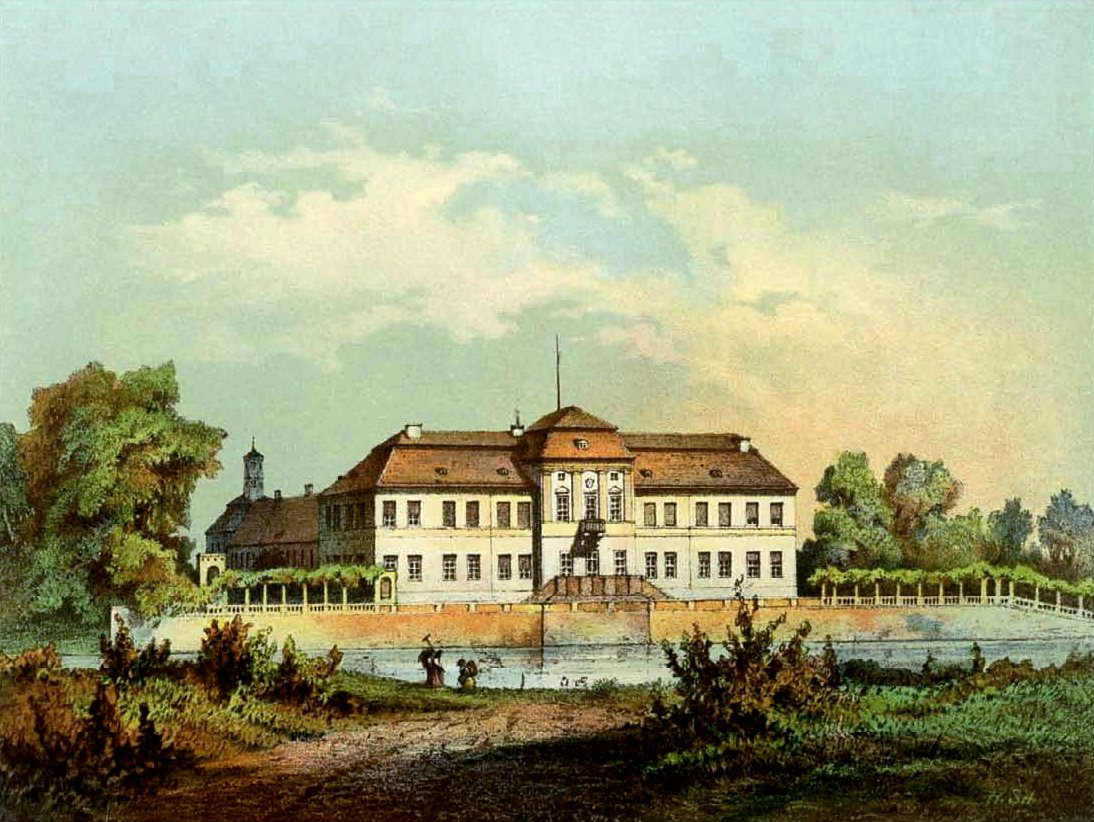 Schloss Plaue, Kreis Westhavelland, Provinz Brandenburg Lithografie aus dem 19. Jahrhundert